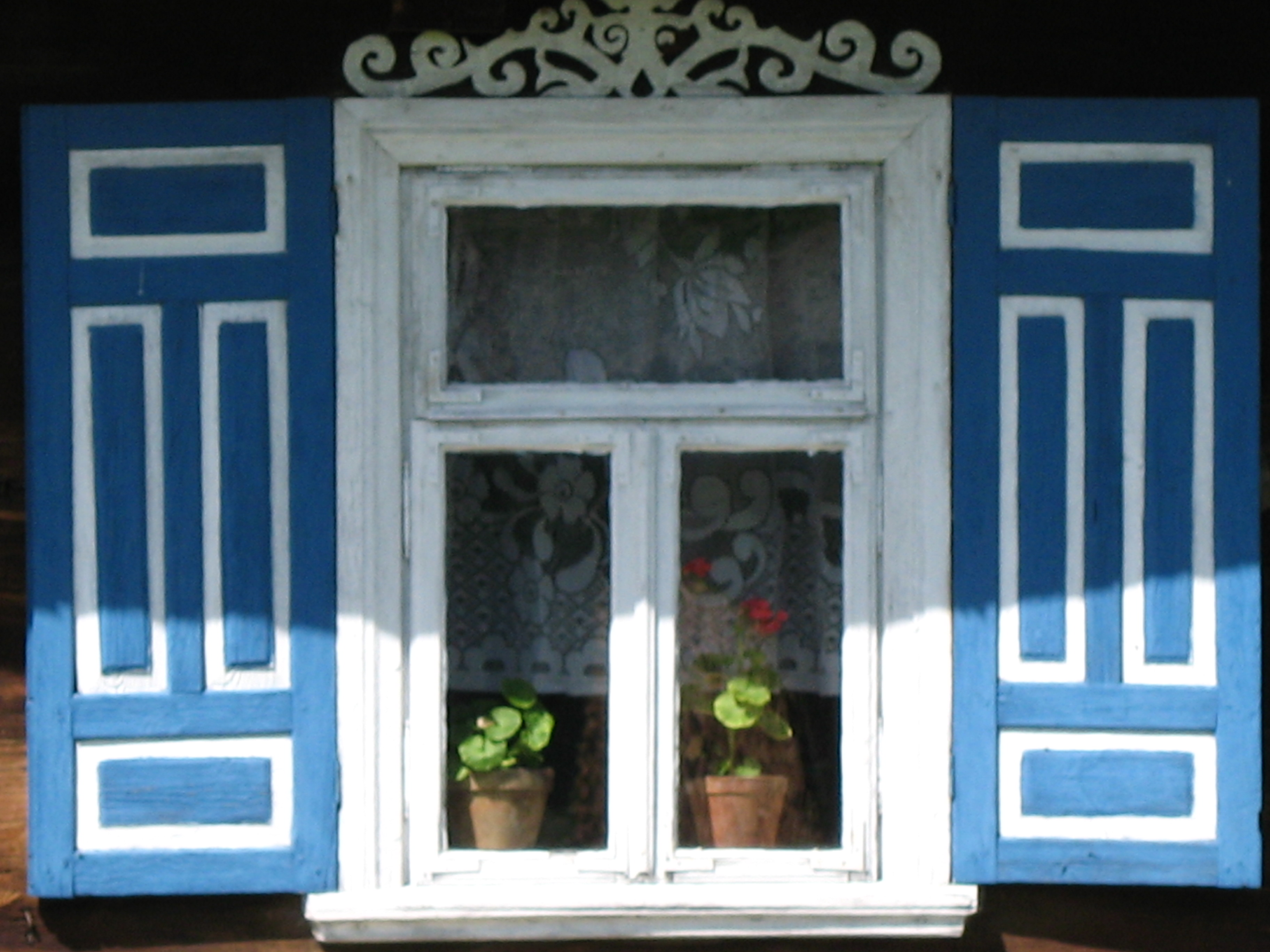 Podlaski styl zdobienia okien.